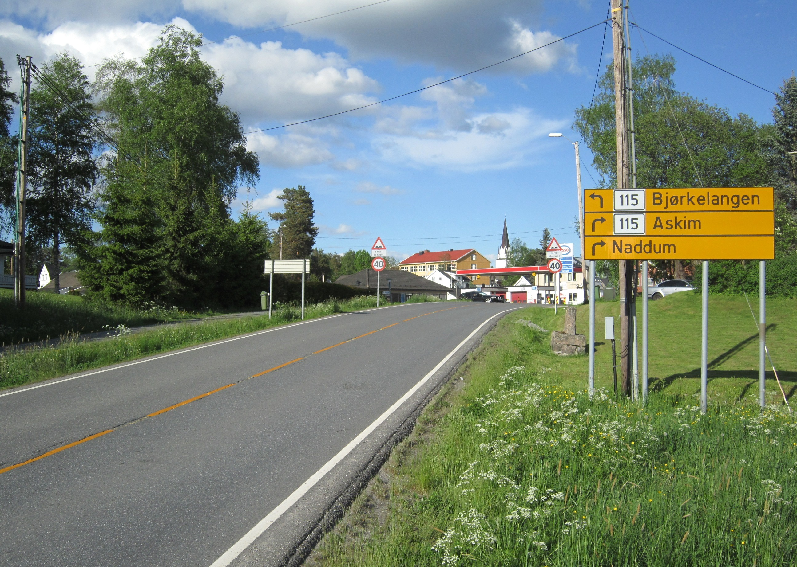 Primær fylkesvei 169 like vest for Løkenkrysset